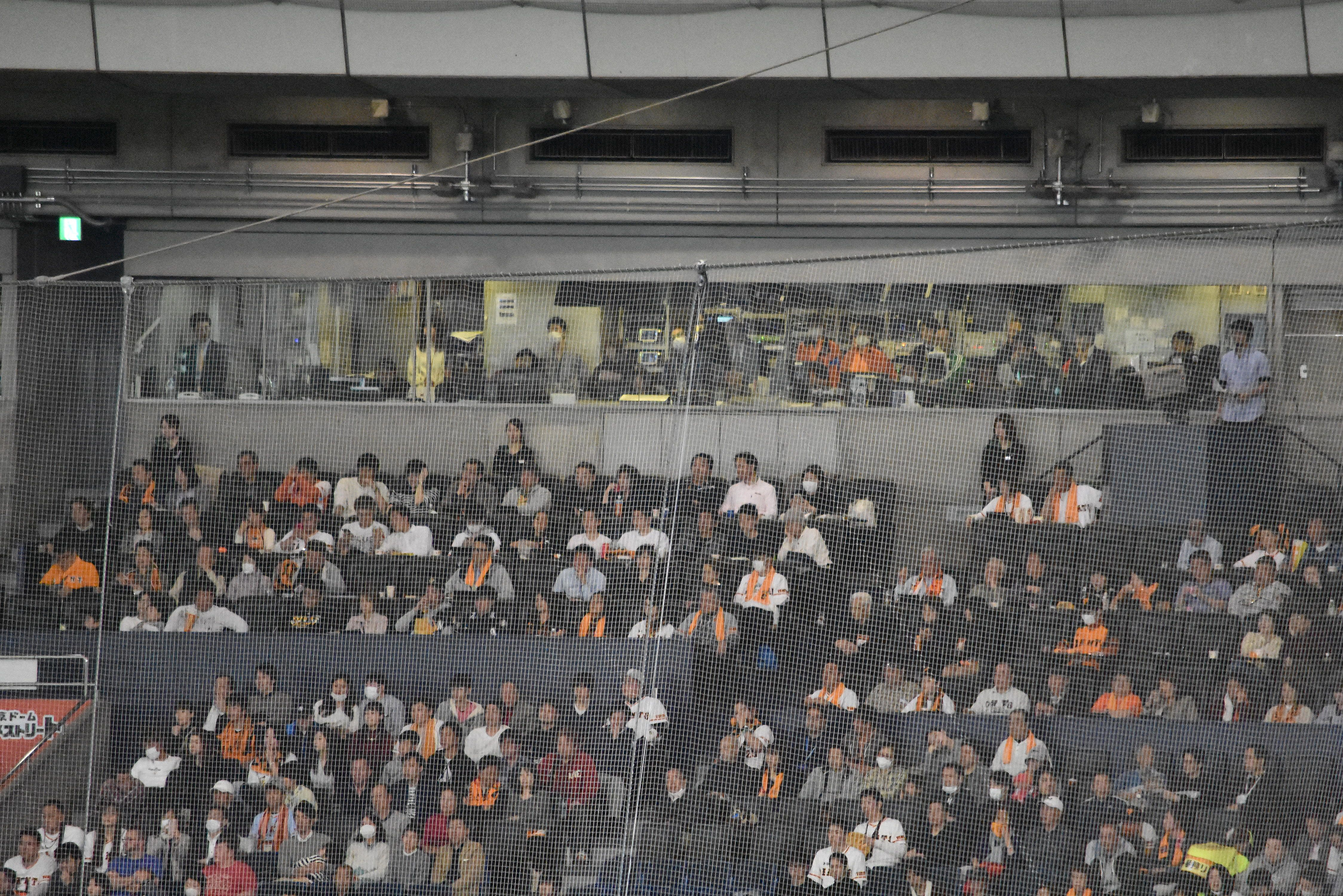 東京ドーム 放送席 Nikon D3400